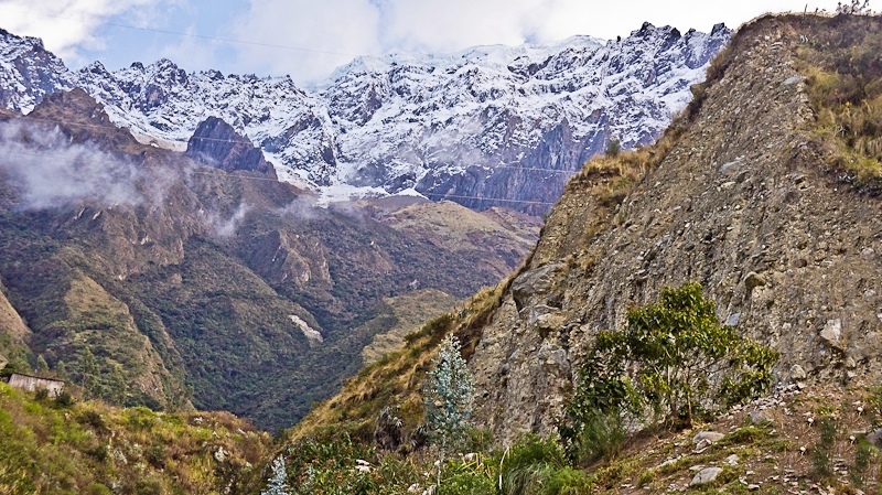 Montanhas del Andes peruanos